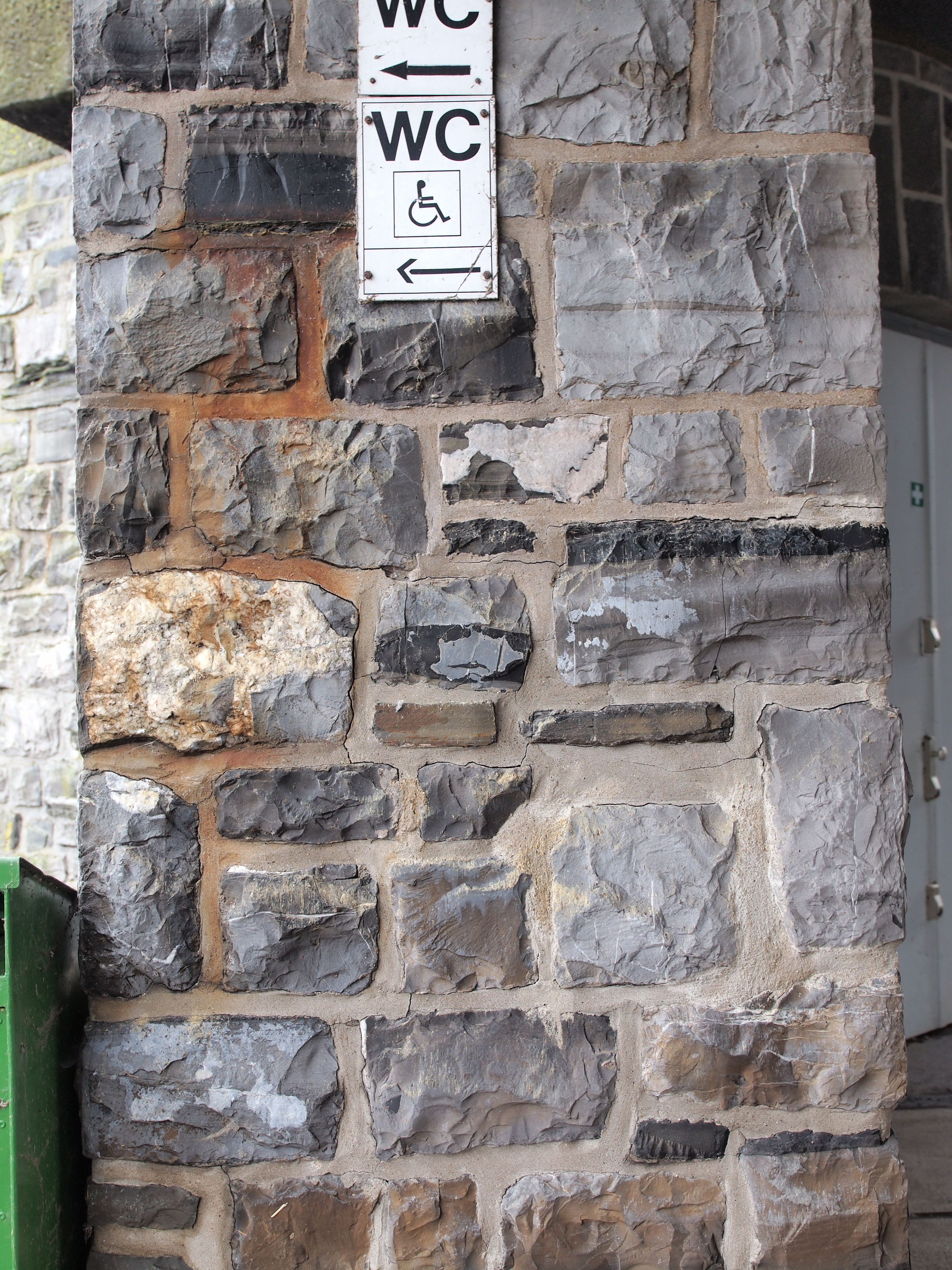 Möhnesee, Mauerwerk aus Grauwacke